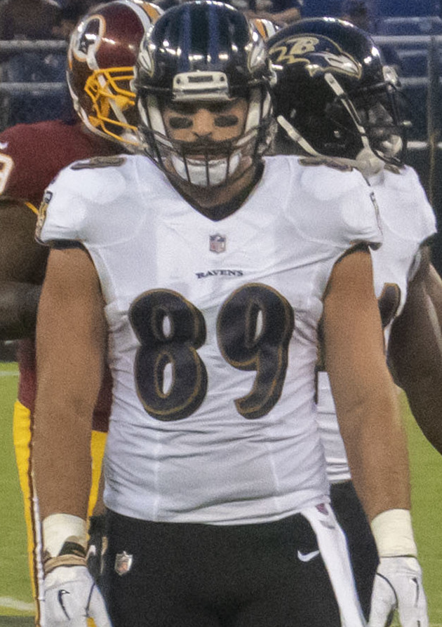 Redskins at Ravens 08/30/18